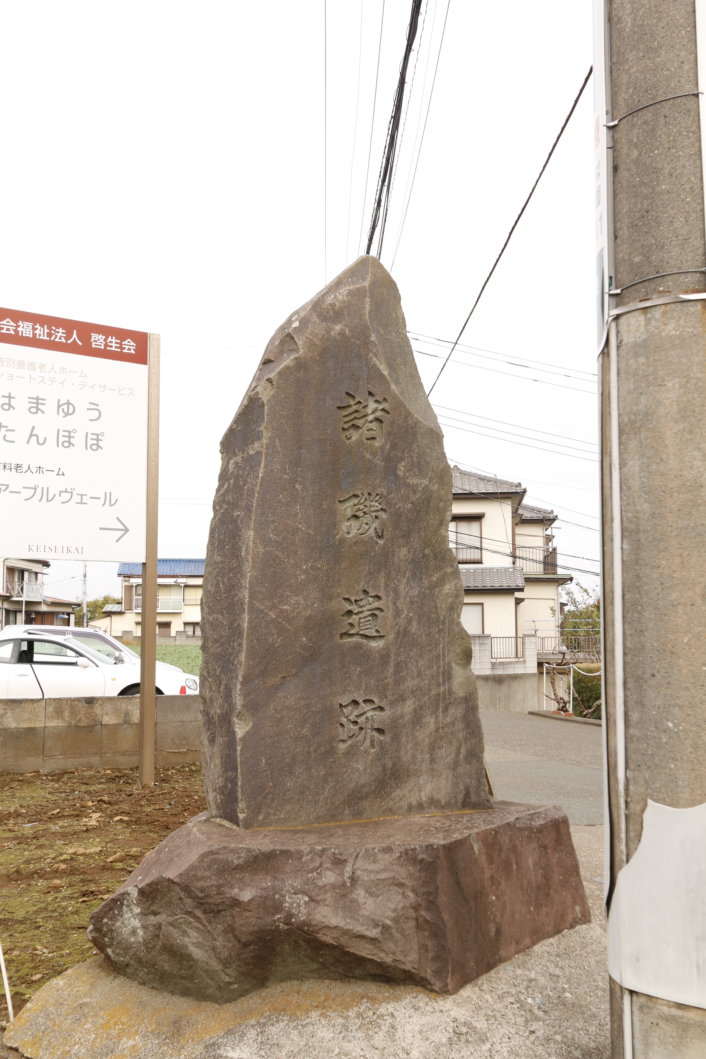 諸磯遺跡の碑